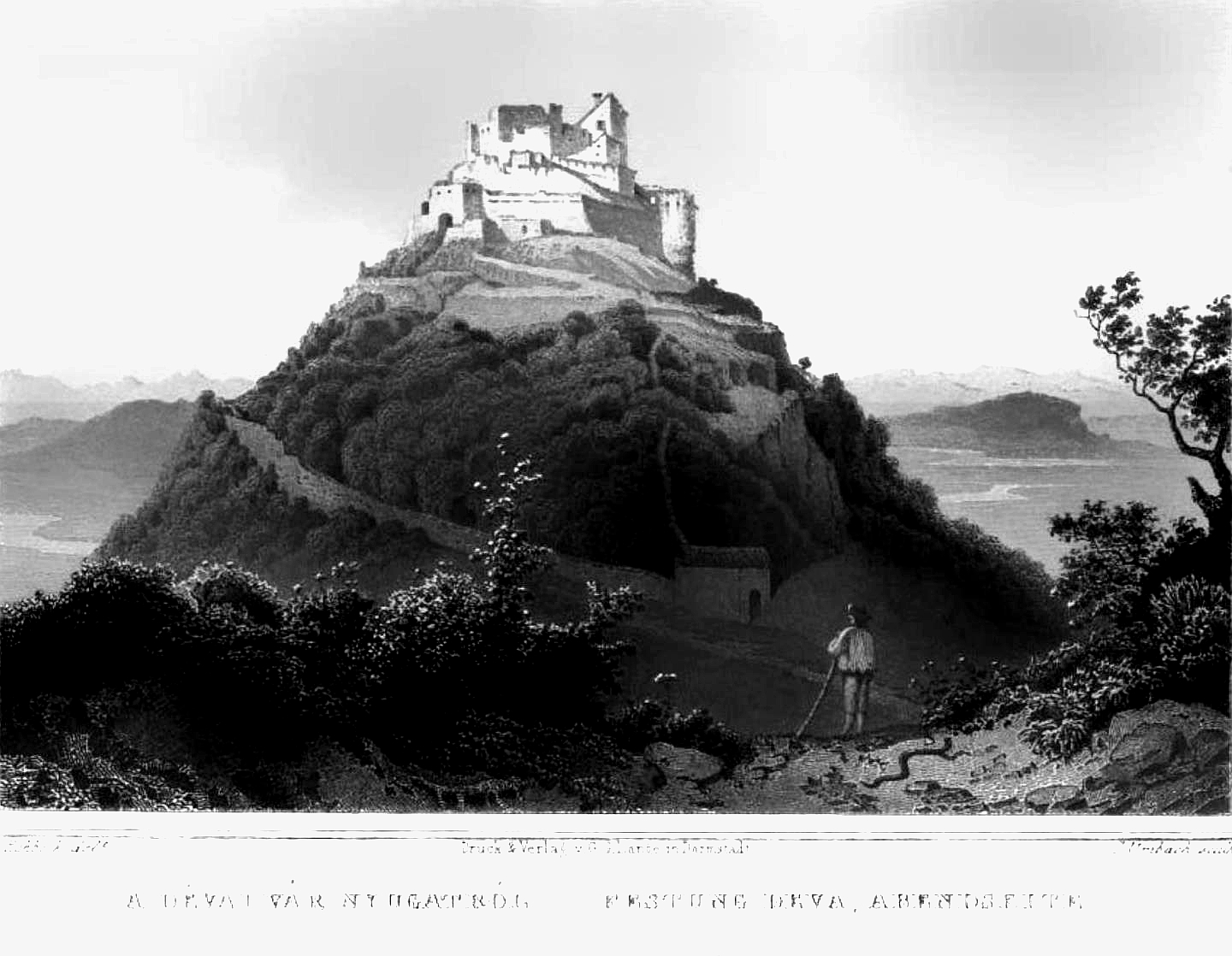 A dévai vár nyugat felől Magyarország és Erdély eredeti képekben: Rajzolta Rohbock Lajos. Történelmi és helyirati szöveggel. Irta Hunfalvy János, 1. kötet,1. kiadás